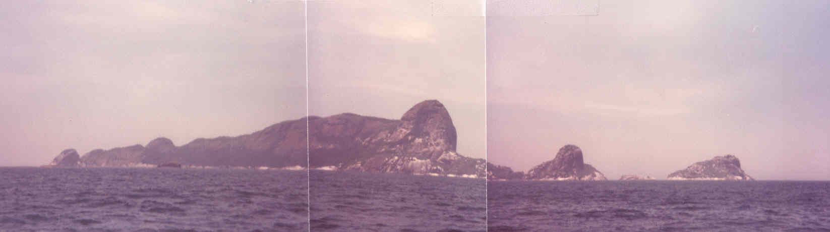 Arquipelago de Alcatrazes,SP,Brasil